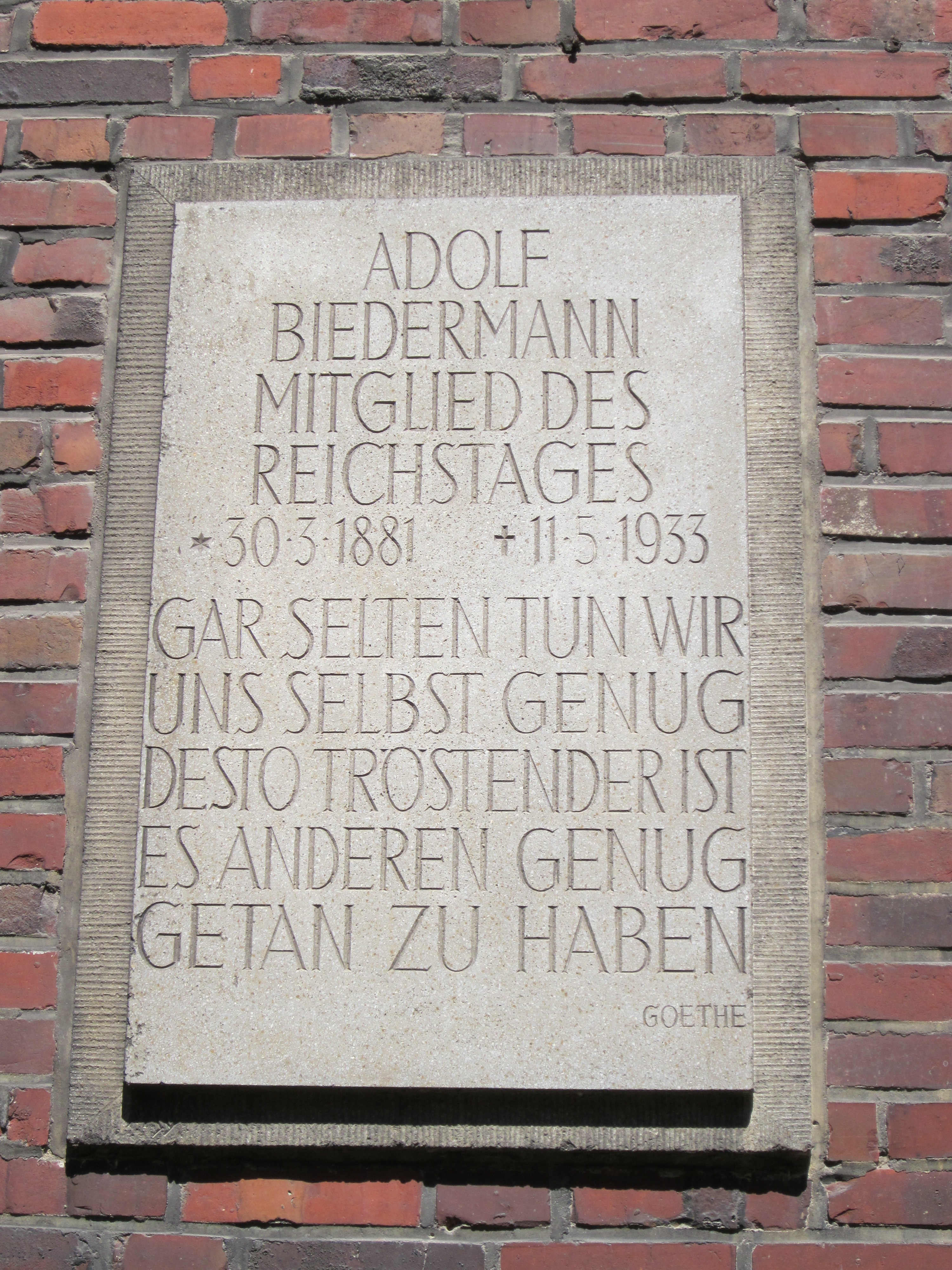 Gedenktafel für den wahrscheinlich von Nationalsozialisten ermordeten SPD-Reichstagsabgeordneten Adolf Biedermann in der Jarrestraße in Winterhude.